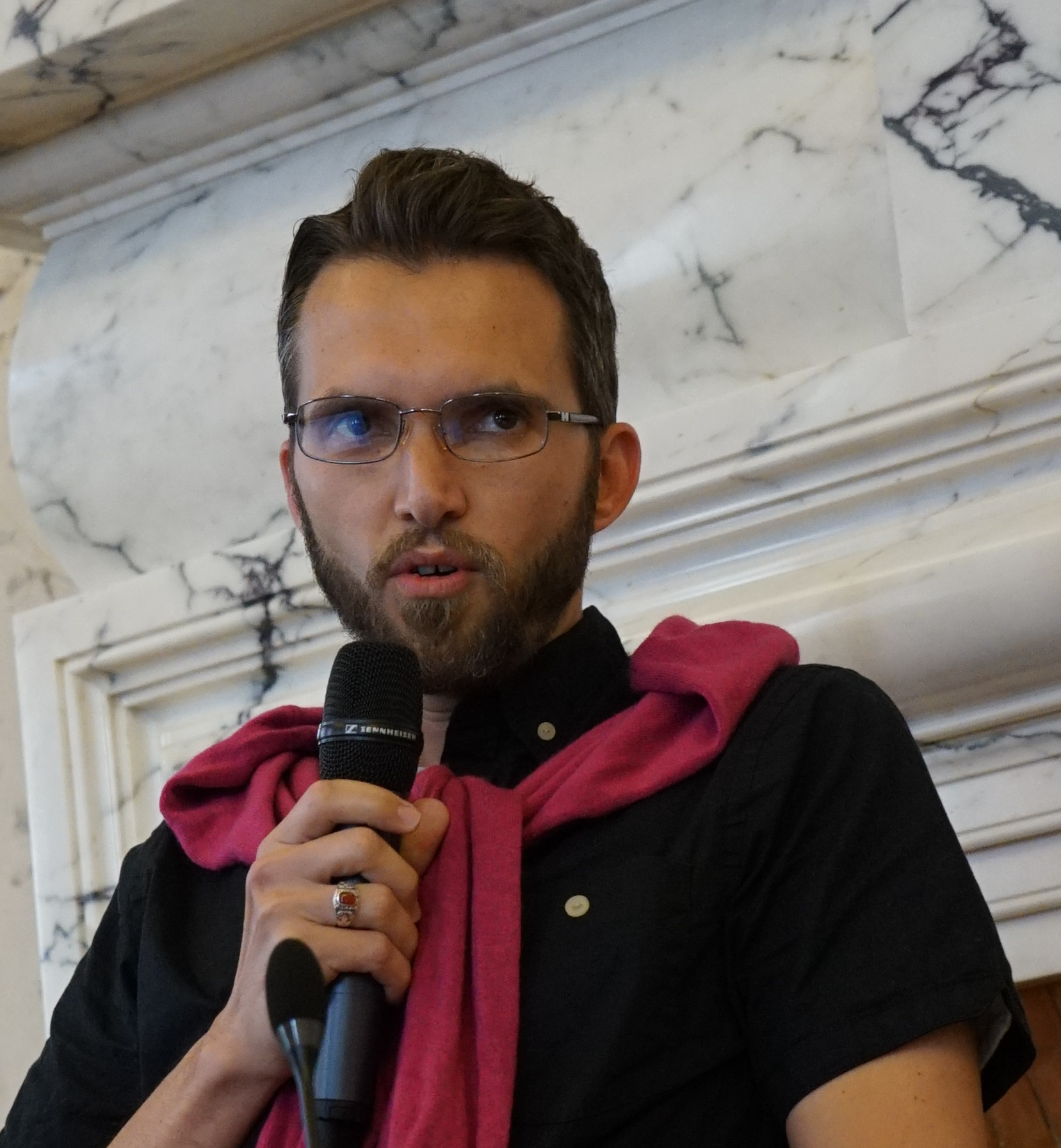 conférence pour l'association Exaequo.